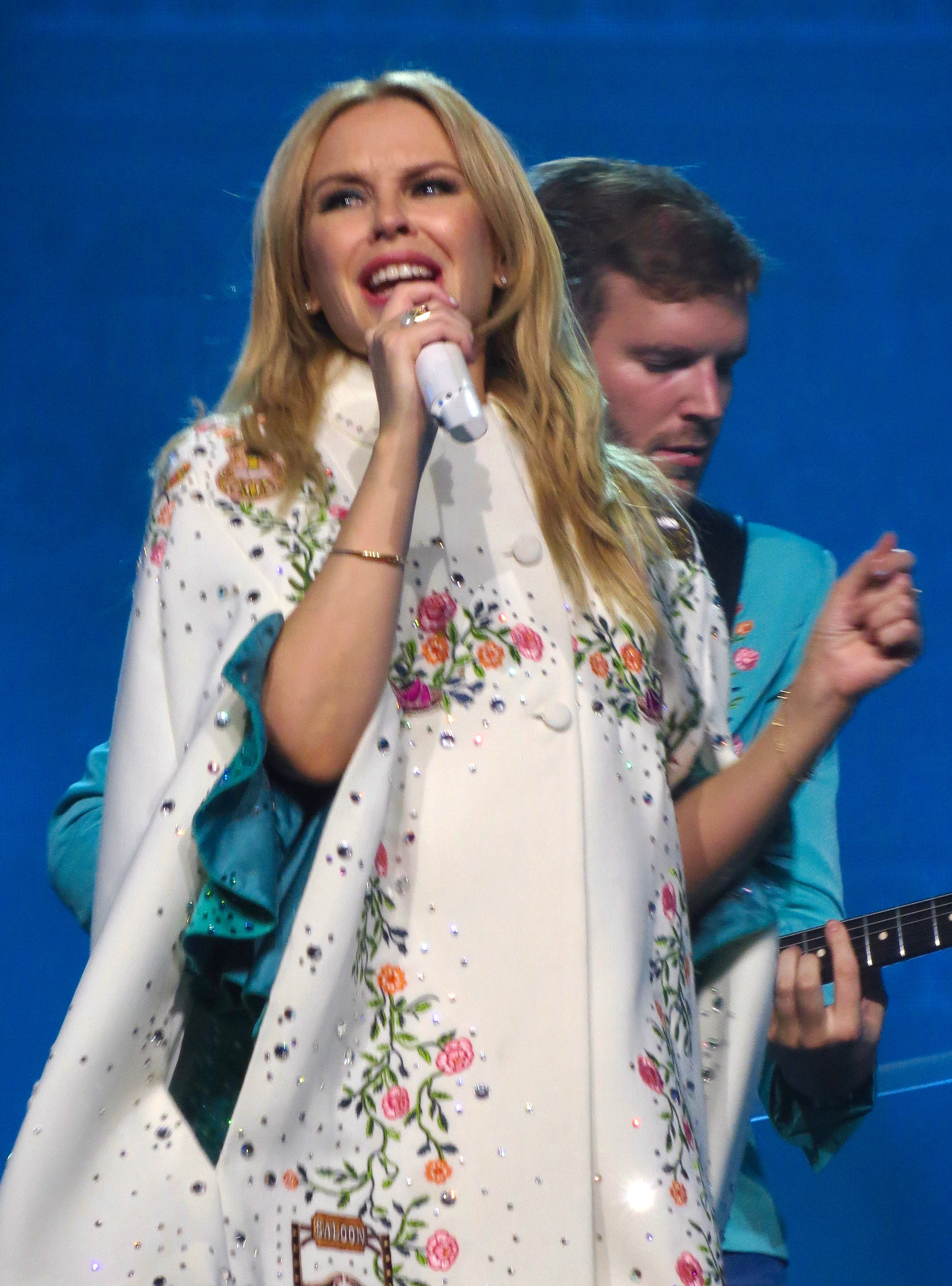 Kylie Minogue 11